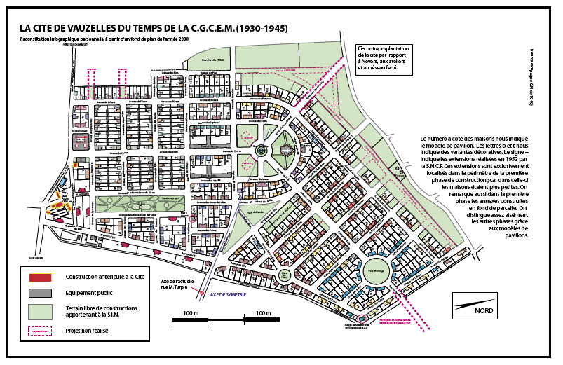 La cité-jardin, plan général et projets